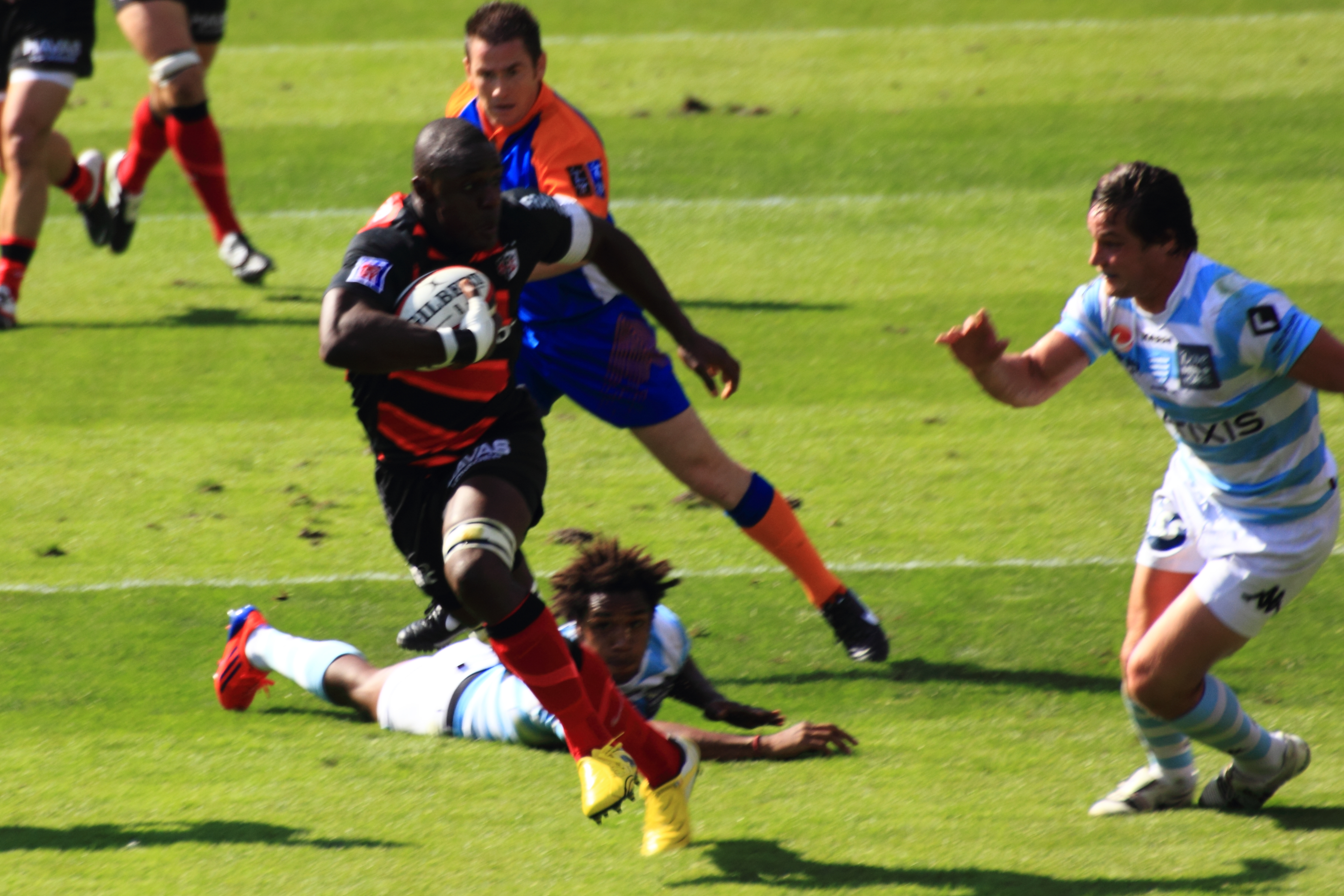 Nyanga accélère après avoir évité le plaquage de Fall